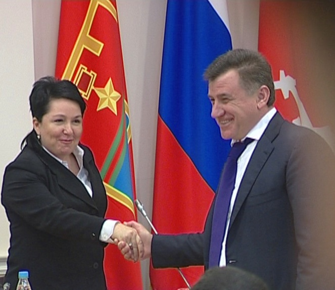 Губернатор Волгоградской области Сергей Боженов и Ирина Гусева